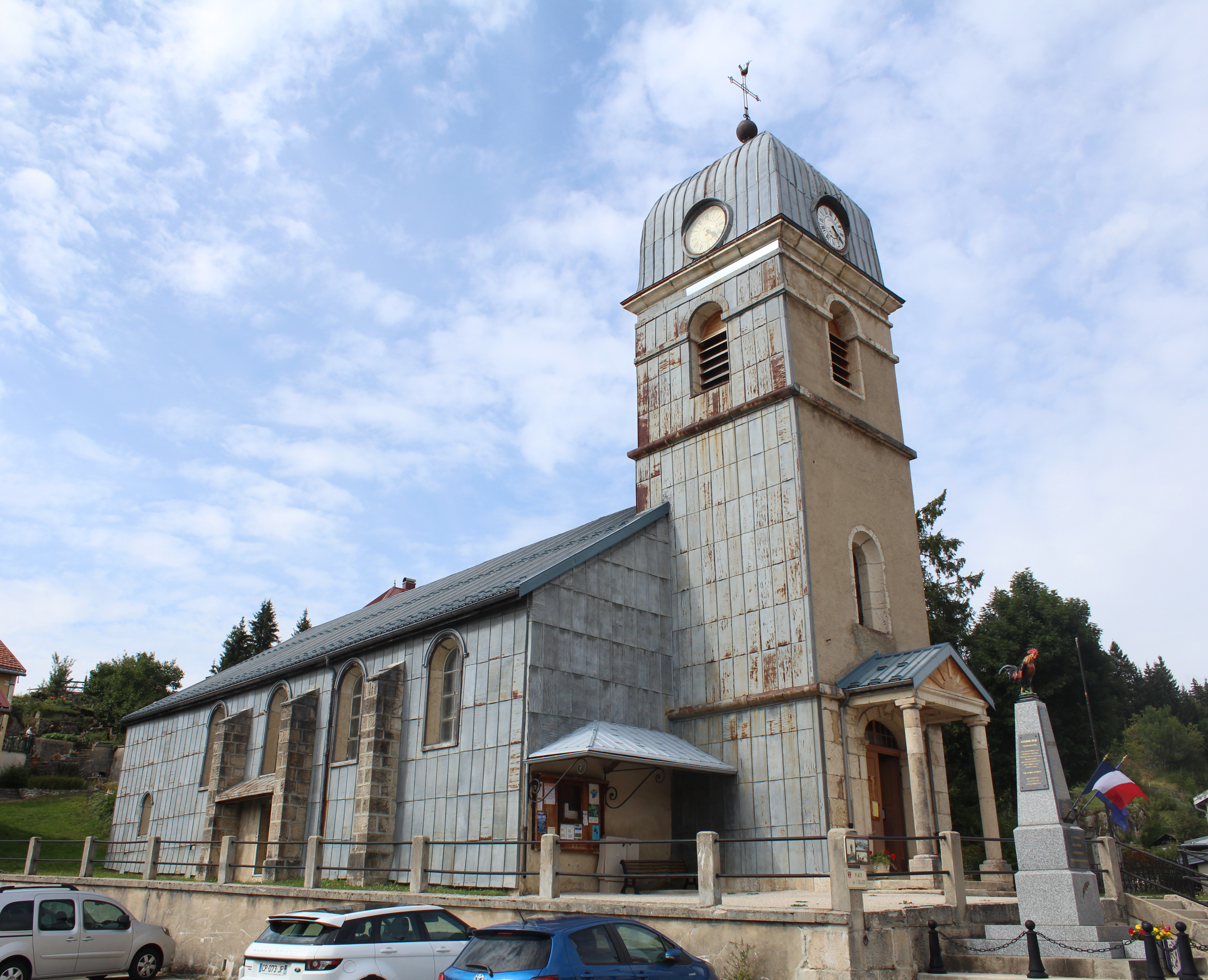 Église Saint-Oyant de La Pesse.